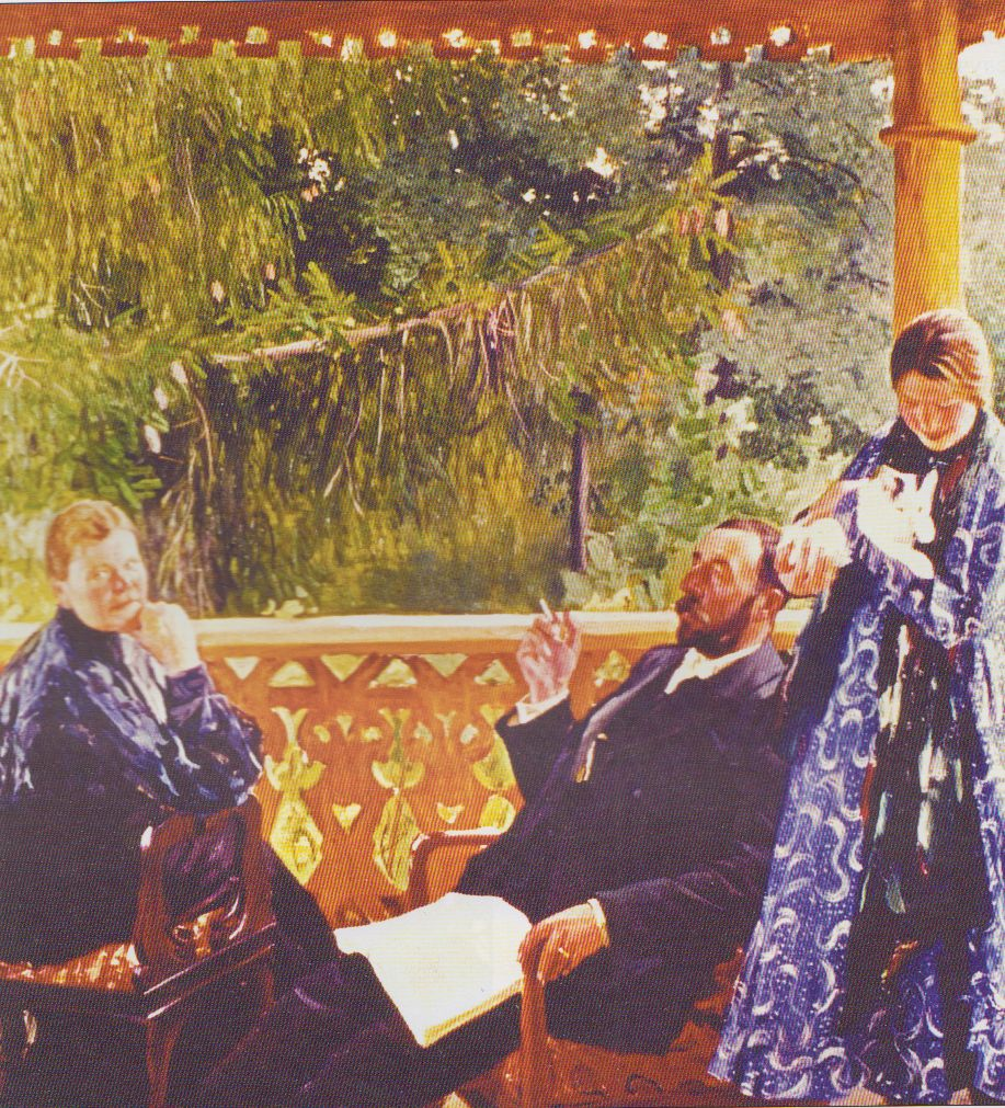 Семья профессора Б. К. Поленова (1859—1923) Холст, масло. 1903. Художественный музей Бельведер (Вена)